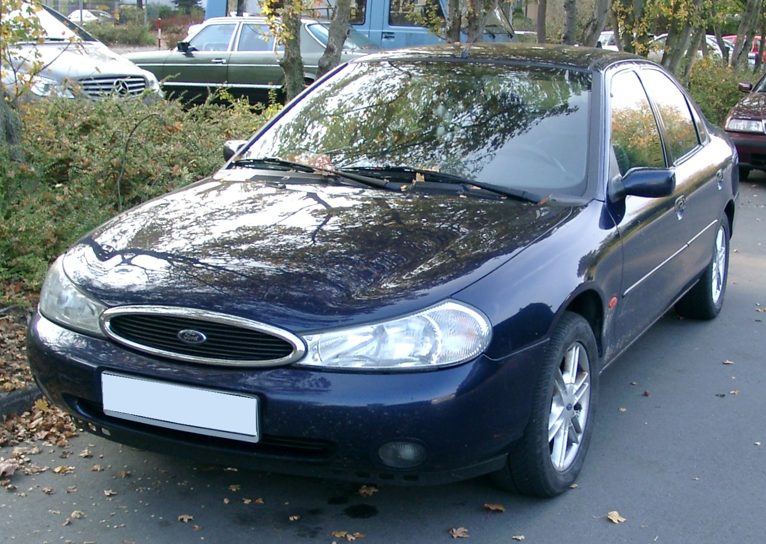 Ford Mondeo, Modelljahr 1997